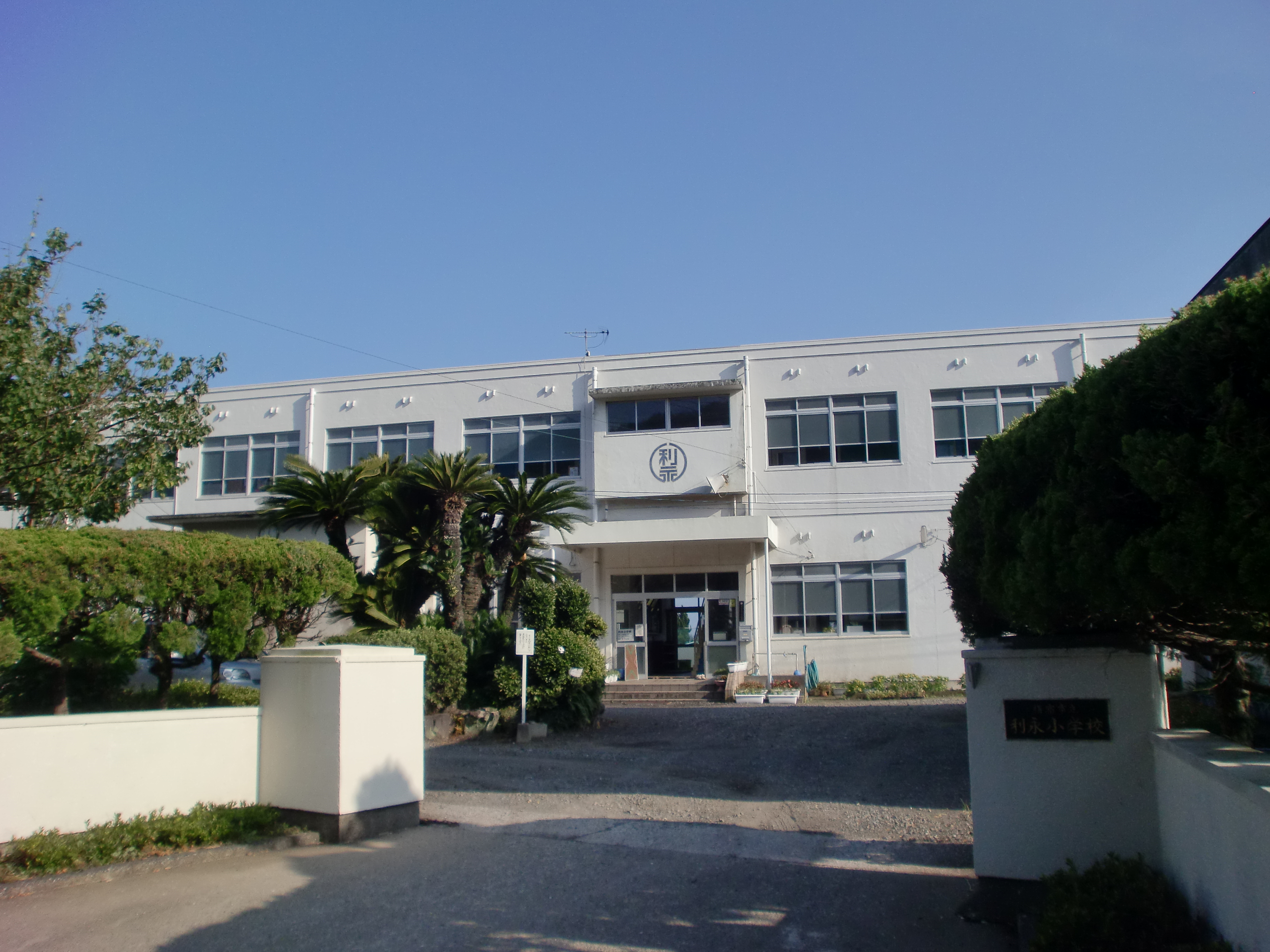 指宿市立利永小学校の校門からの外観。